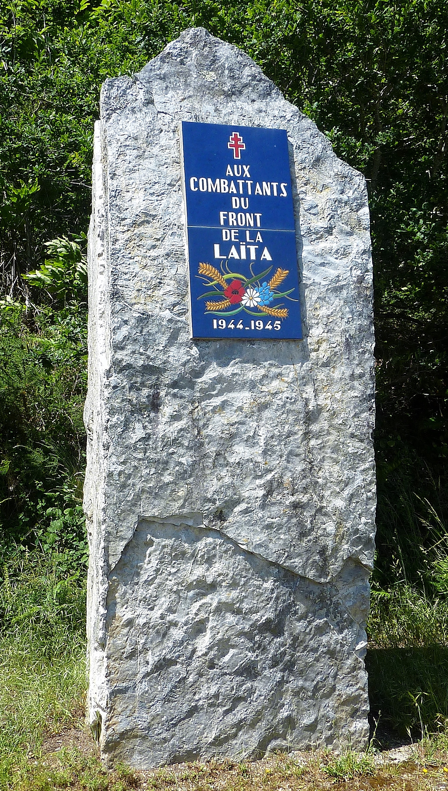 Le monument commémoratif "Aux combattants du Front de la Laïta 1944-1945" situé à proximité du pont de Saint-Maurice (rive droite de la Laïta, en Clohars-Carnoët).